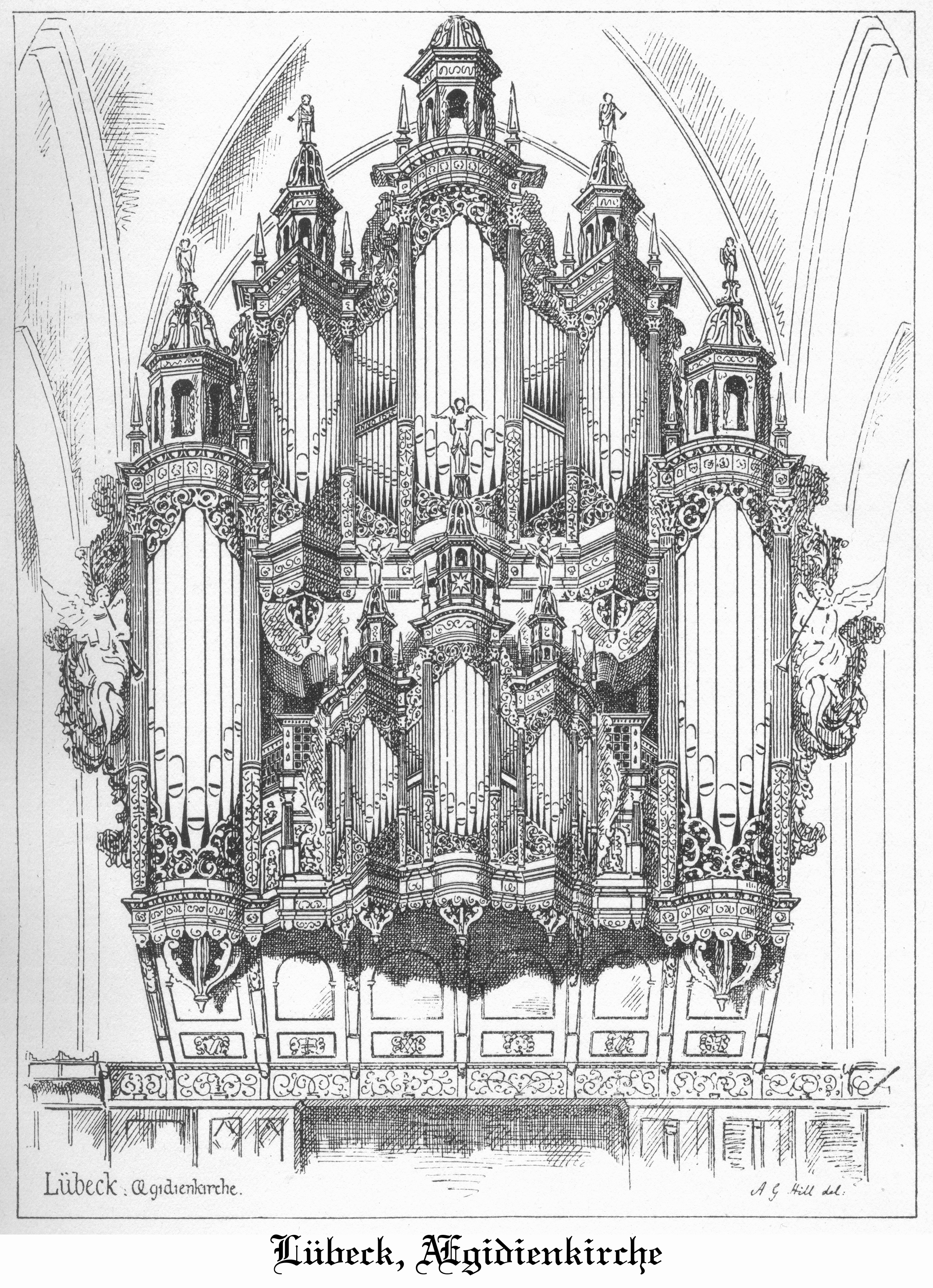 La mia foto di un acquaforte che possiedo io che risale all'Ottocento